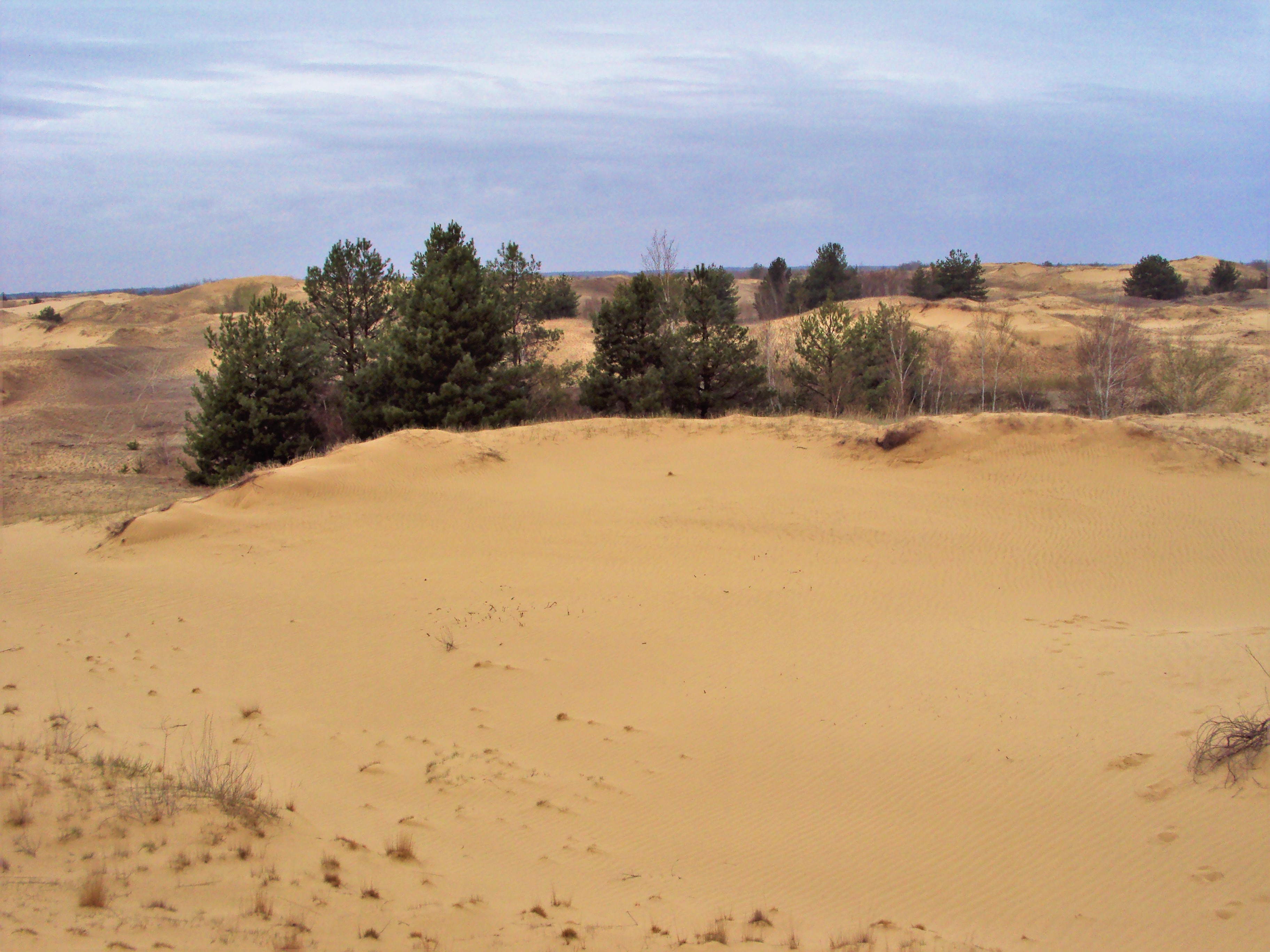 Оазис в пустыне